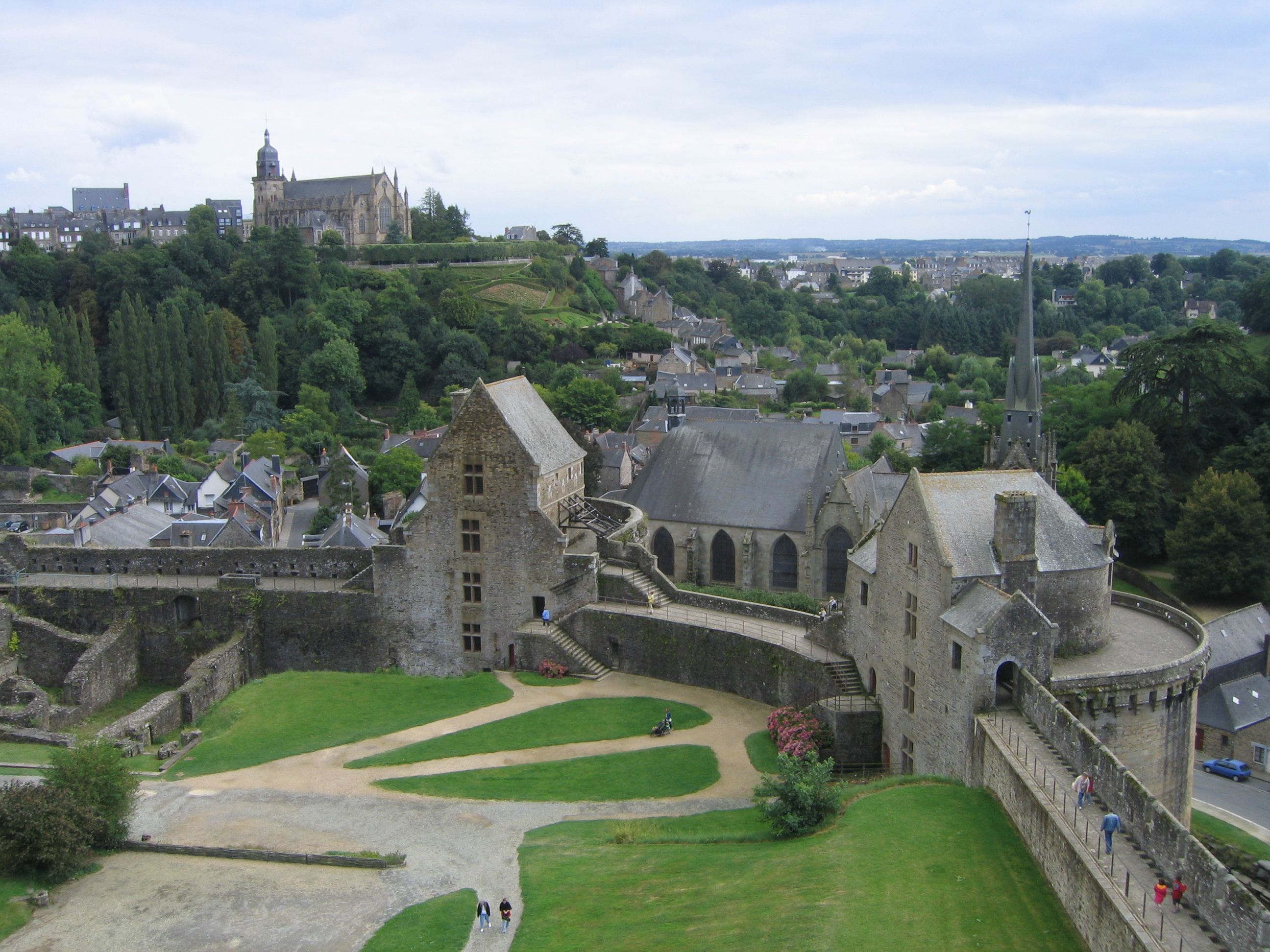 Vue de la cour intérieure